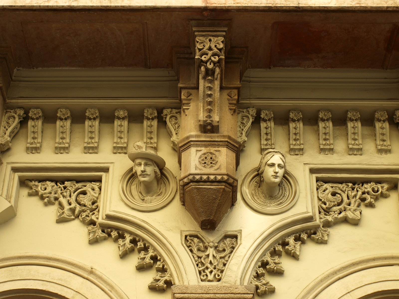 Volt Oszwald-ház (Budapest 5, Nádor utca 22., Széchenyi utca 9.) This is a photo of a monument in Hungary. Identifier: 567